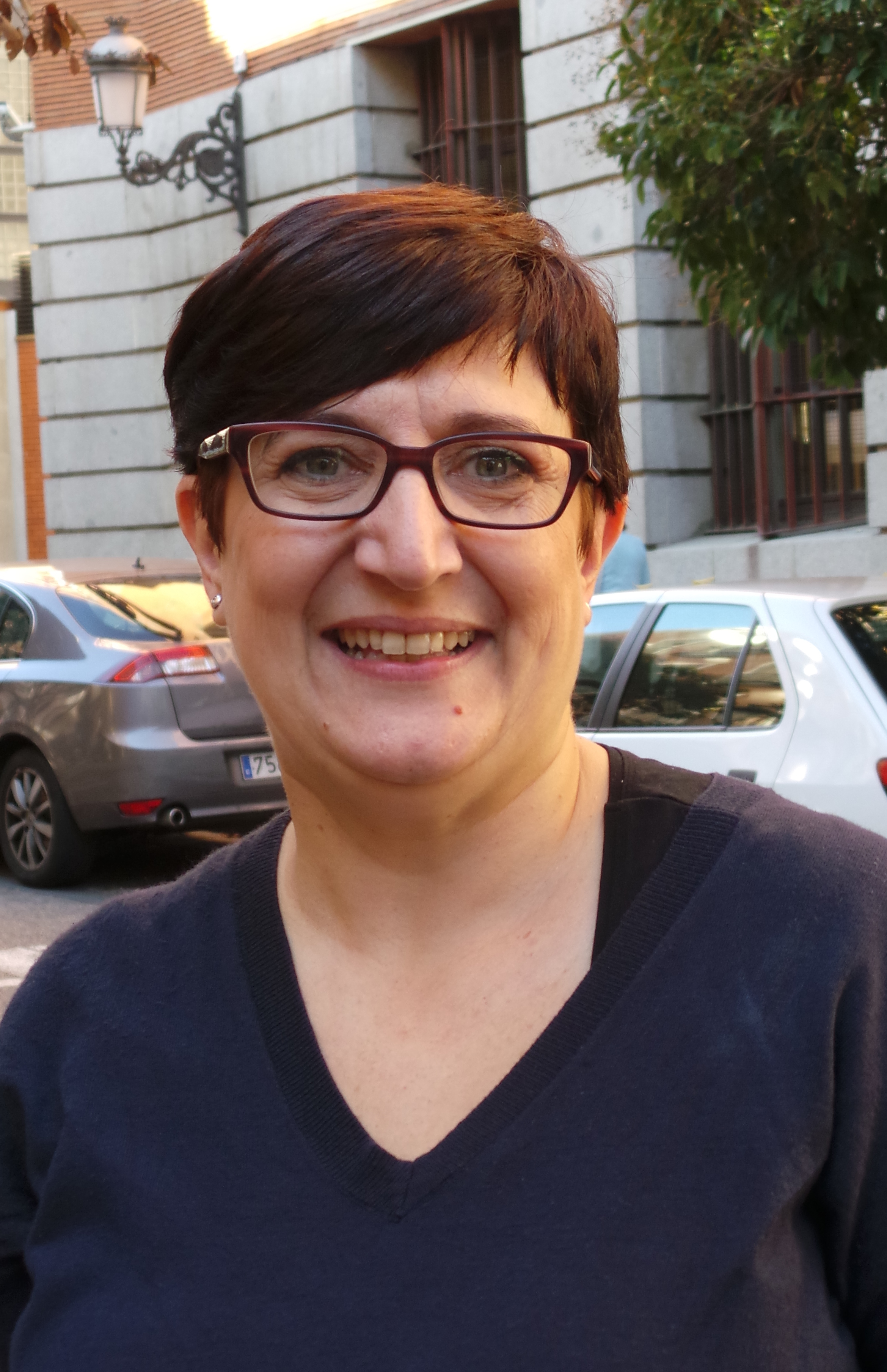 Secretaria de la Mujer del PSC - Noviembre 2015